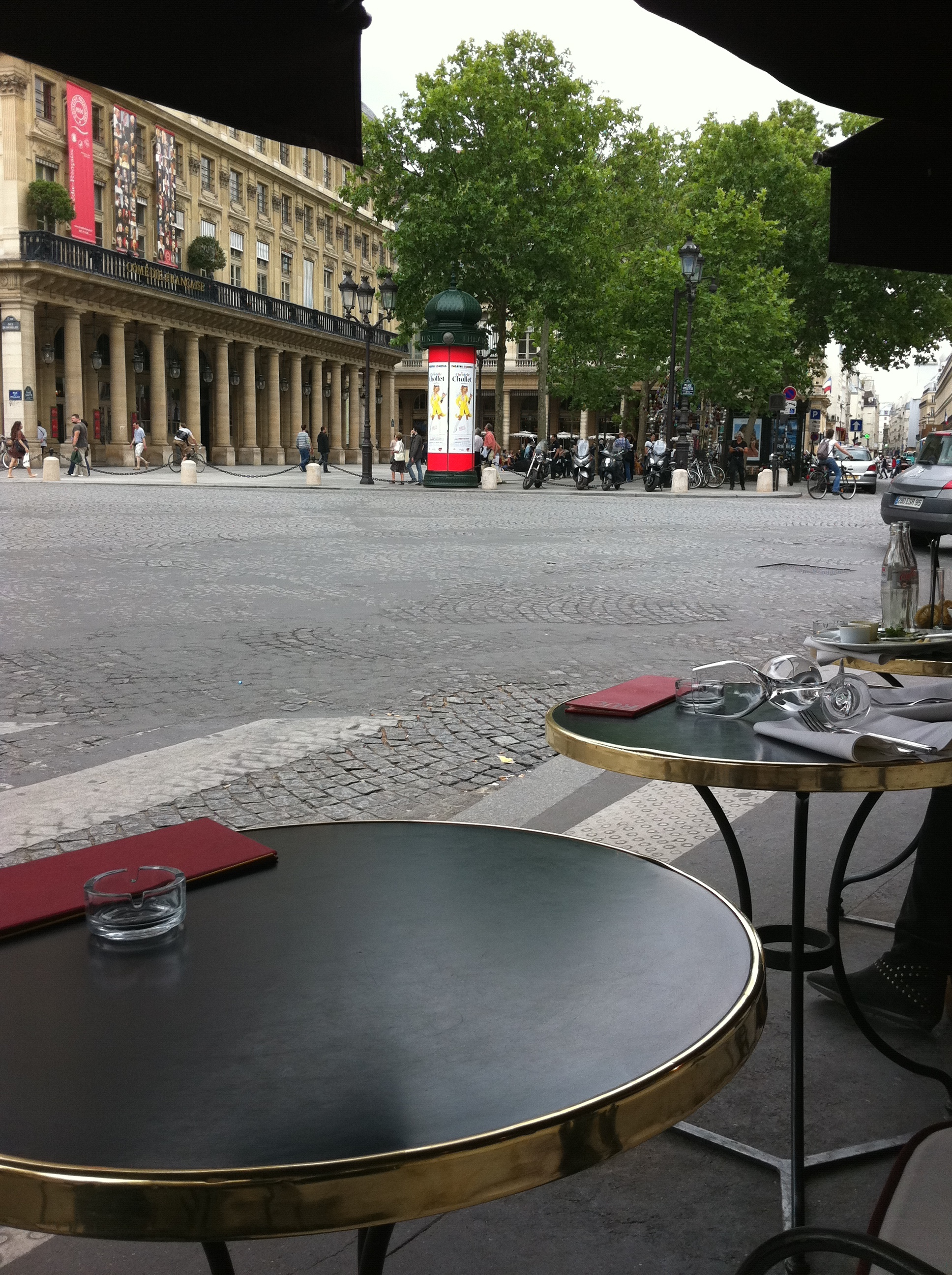 Terrasse du café RUC, au croisement de la rue Saint-Honoré (n°159) et de l'avenue de l'Opéra (Paris, 1er).